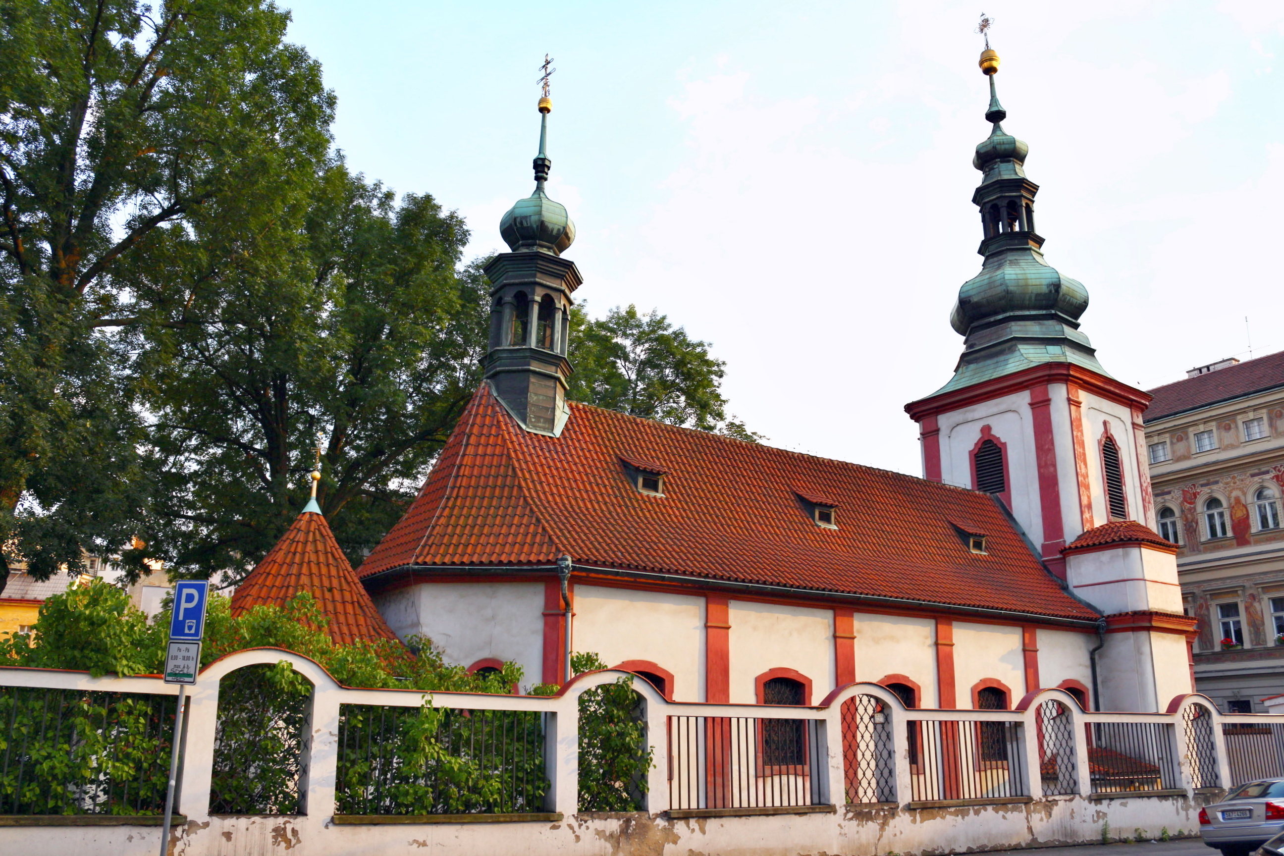 Kostel Nejsv. Trojice v Podskalí